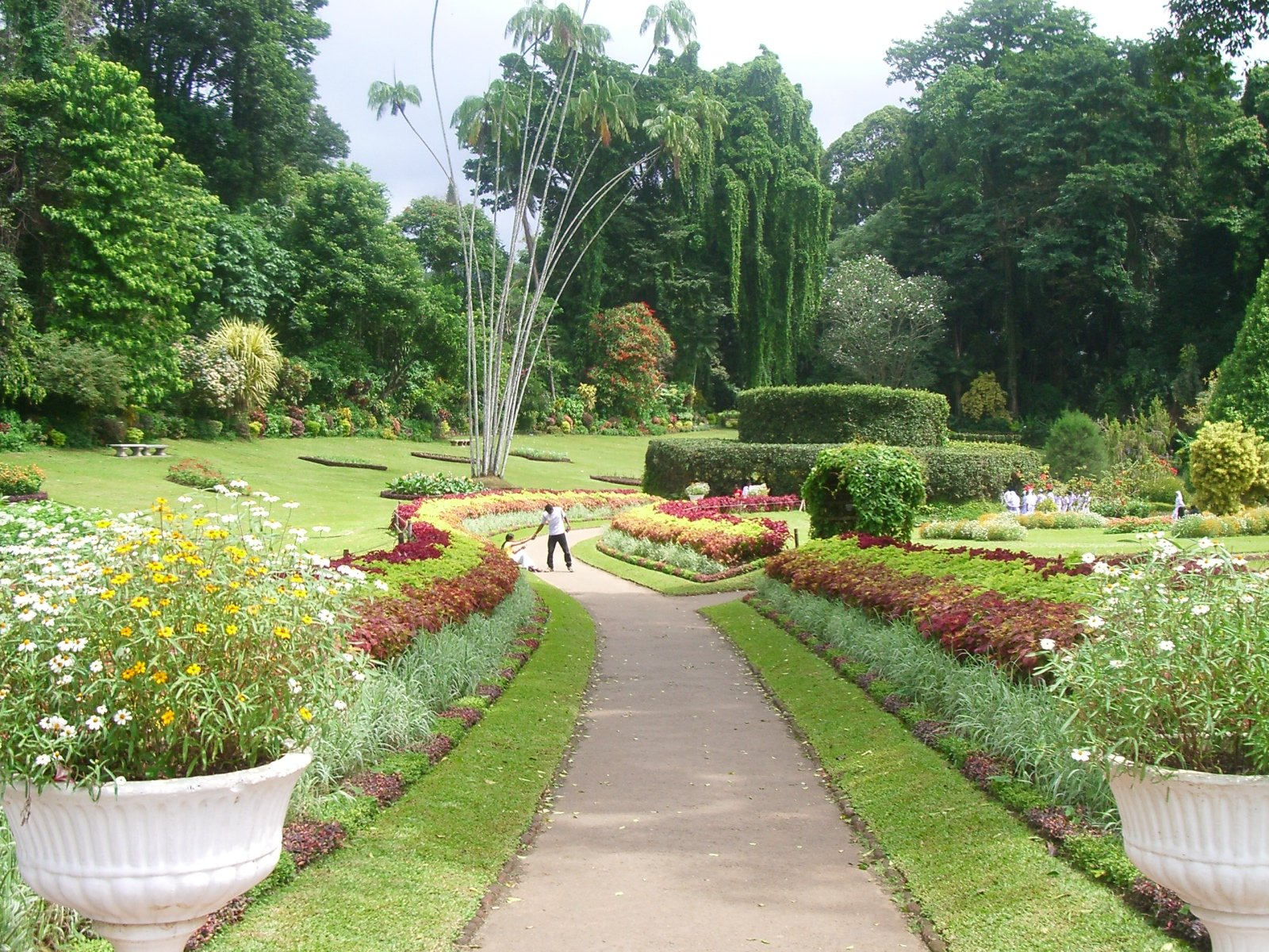 Jardi botanic de Peradeniya a la provincia Central, prop de Kandy, Sri Lanka, imatge feta per J. Ollé el juliol del 2006